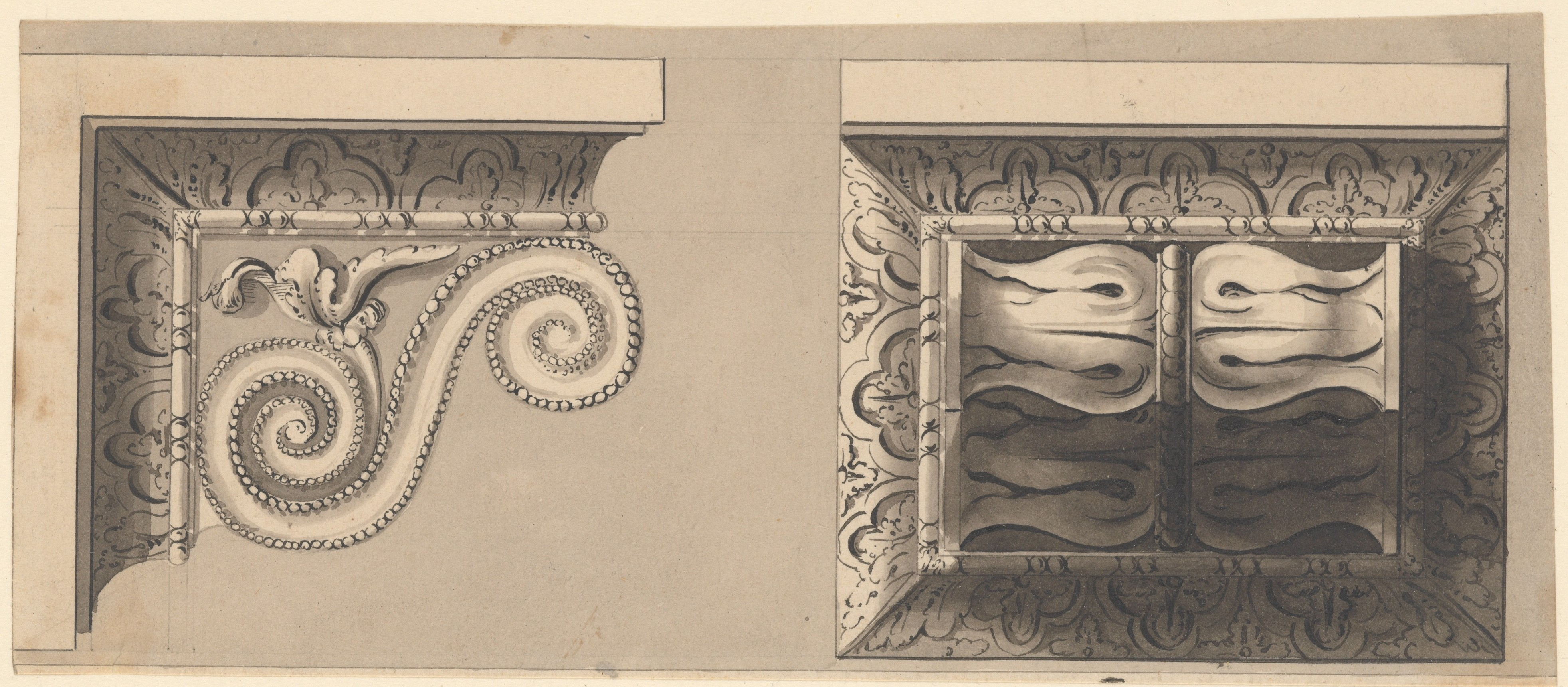 Drawing; Drawings